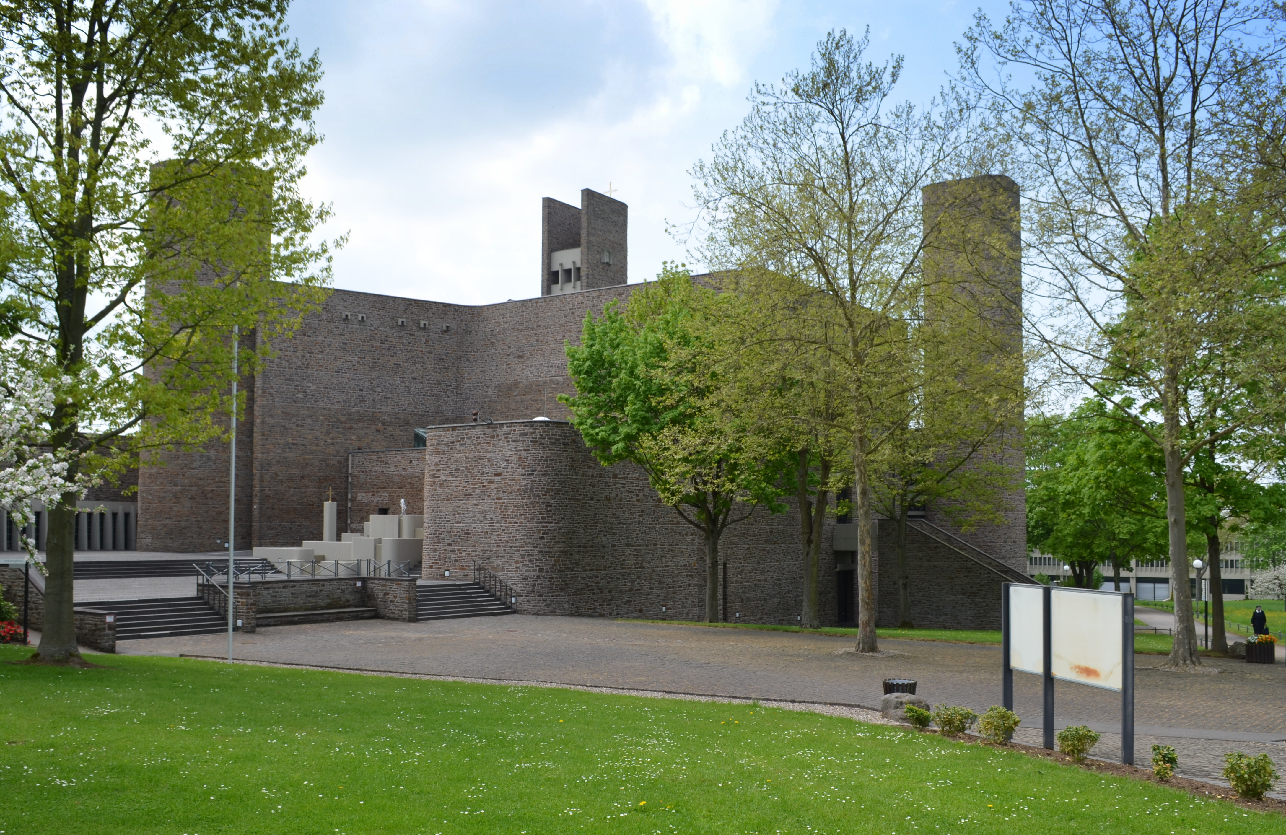 Schönstatt - Aanbiddingskerk